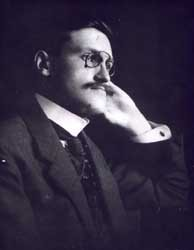 František Taufer